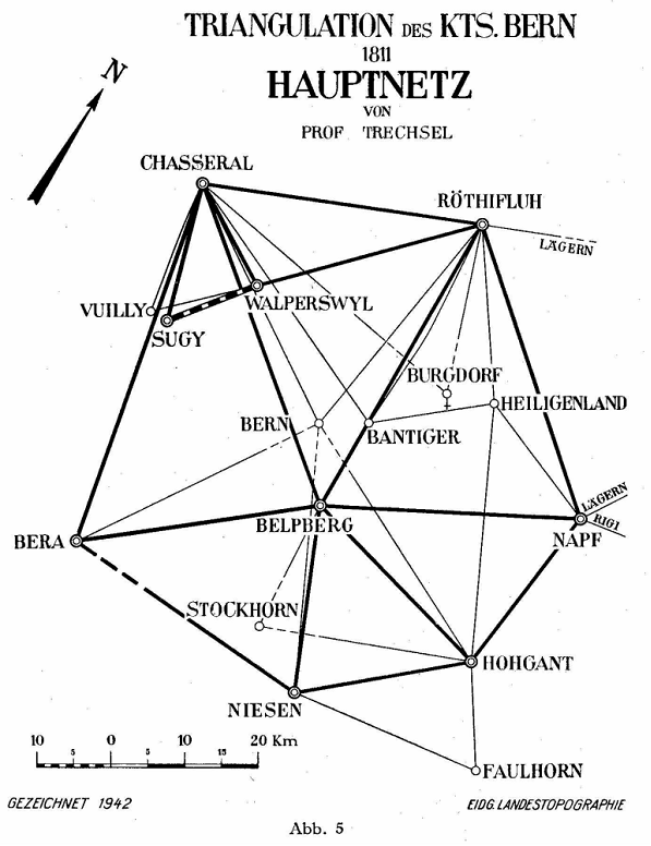 Triangulations Hauptnetz des Kantons Bern von 1811, Schweiz